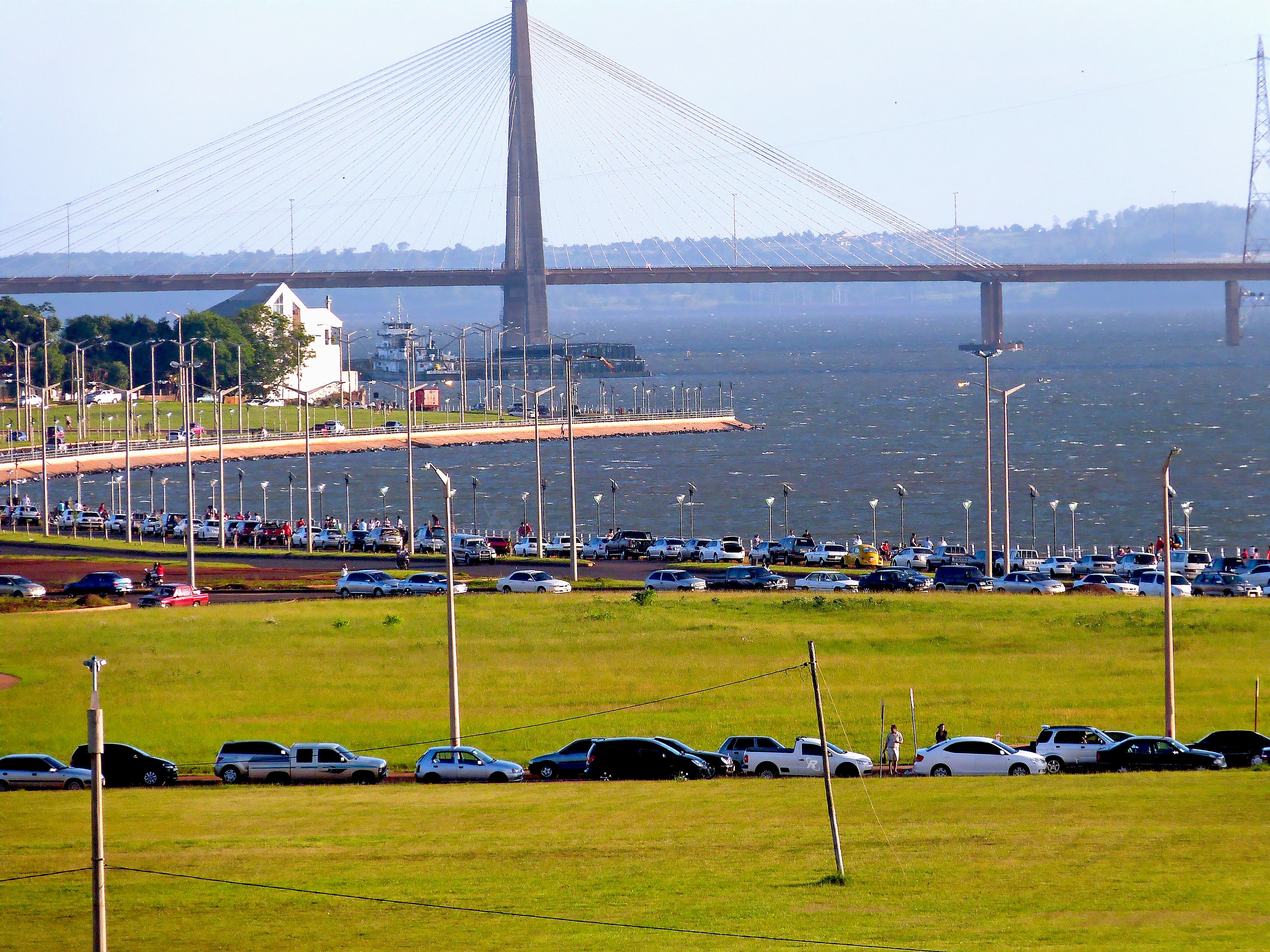 Vista parcial del Puente San Roque González y la Costanera Sur